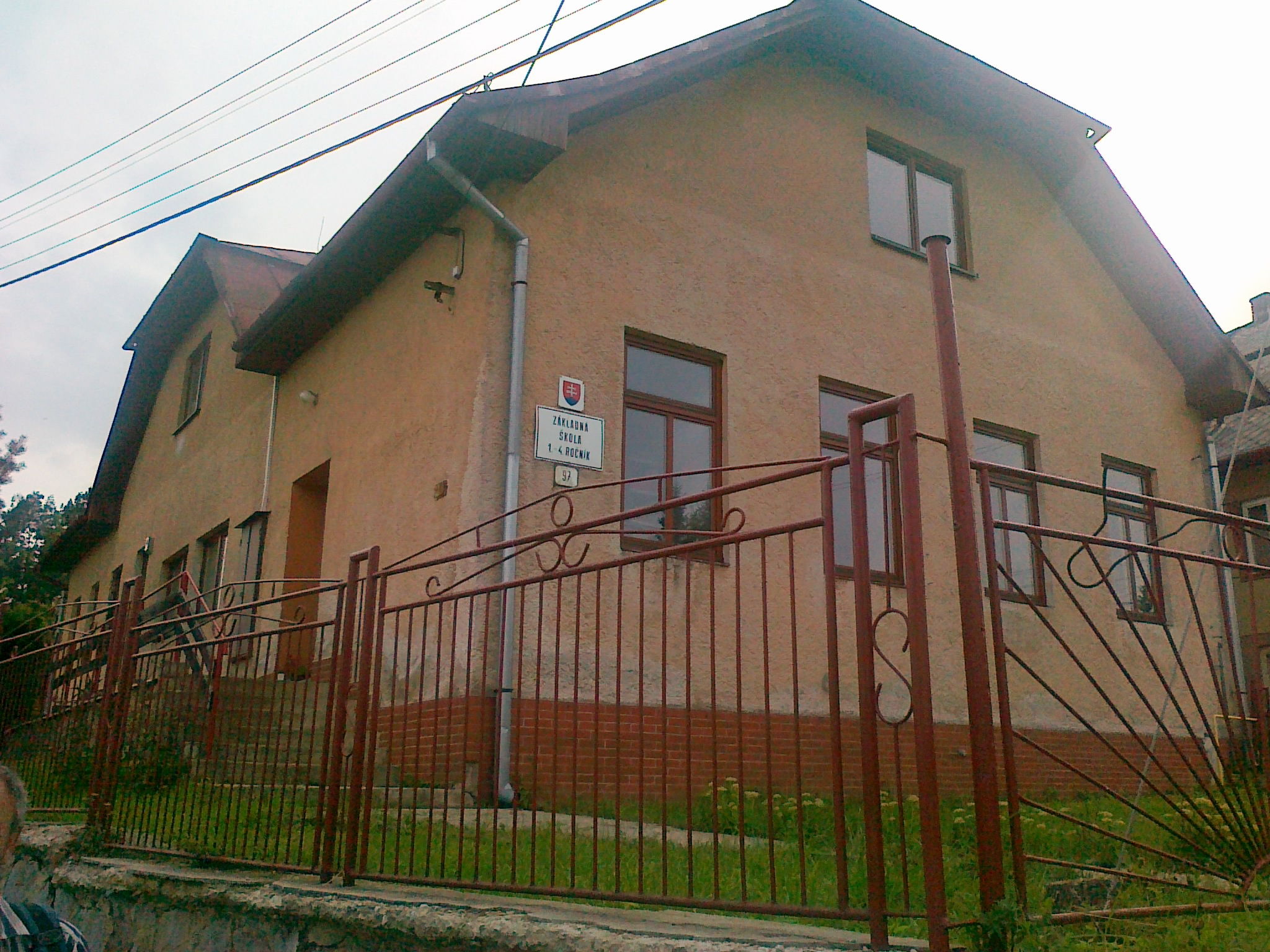 Základná škola v obci Dravce